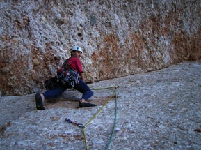 Escalada clàssica a Montserrat